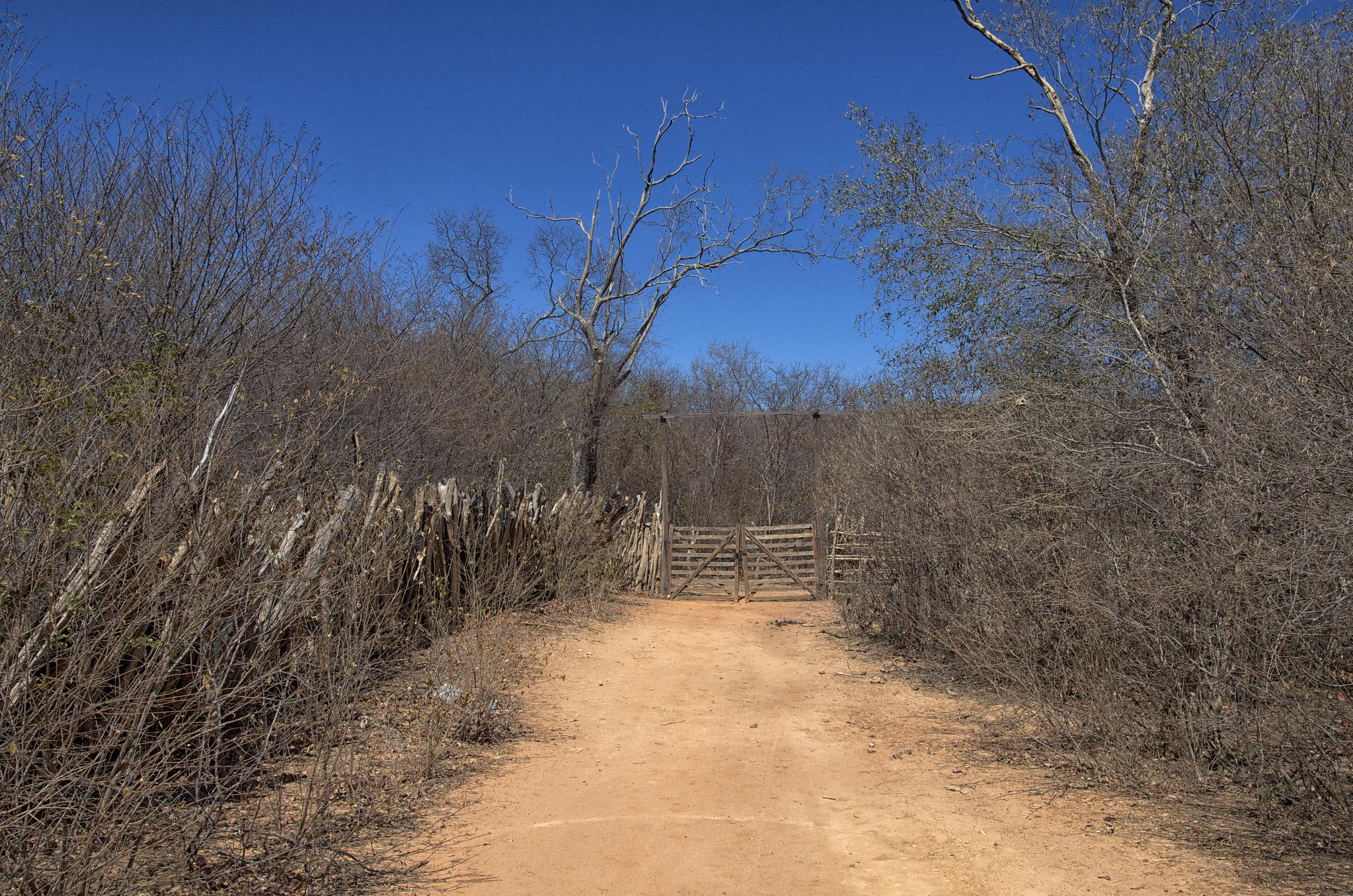 Um mundo chamado Sertão